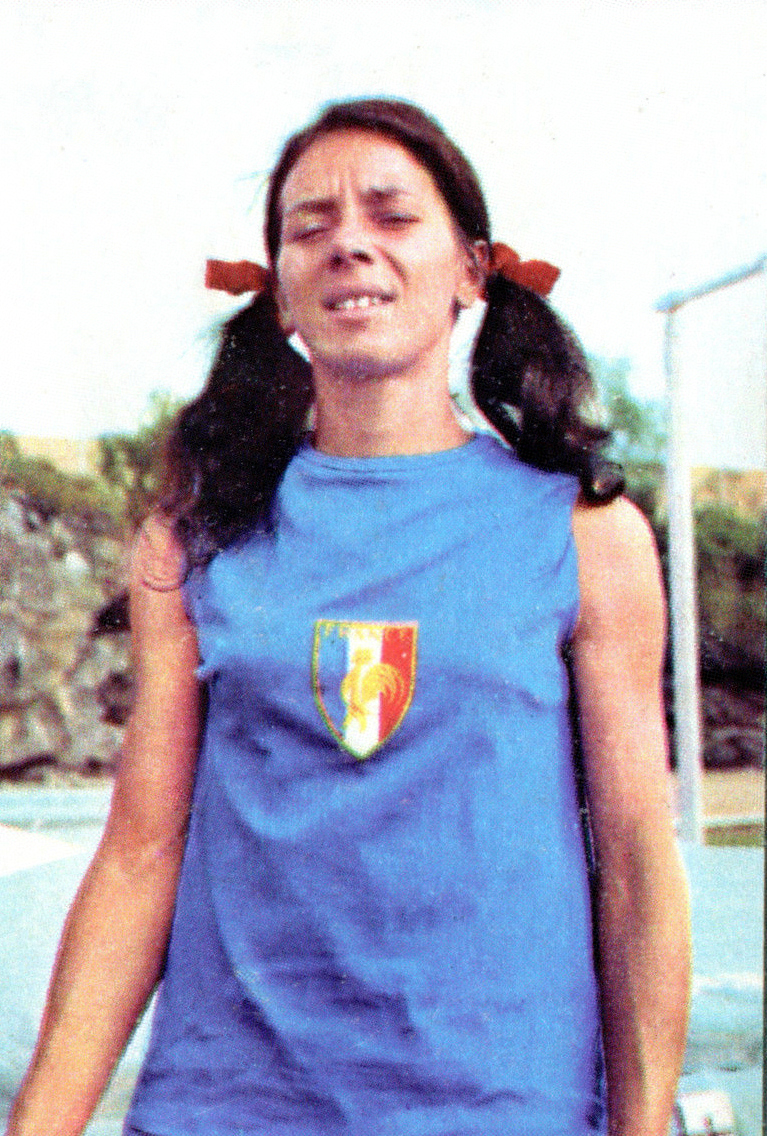 CAMPIONI DELLO SPORT 1969/70-n.93- C. BESSON (FRA)-ATLETICA LEGG-rec